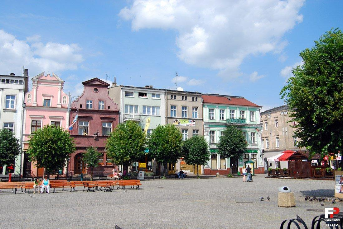 Zabudowa Rynku. Od lewej nr 15, 16, 17, 18 i 19